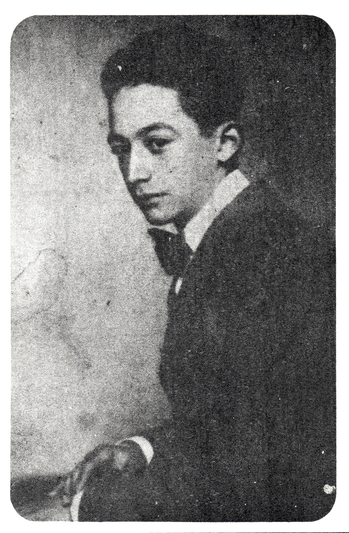 Fotografía tomada en la juventud del escritor.